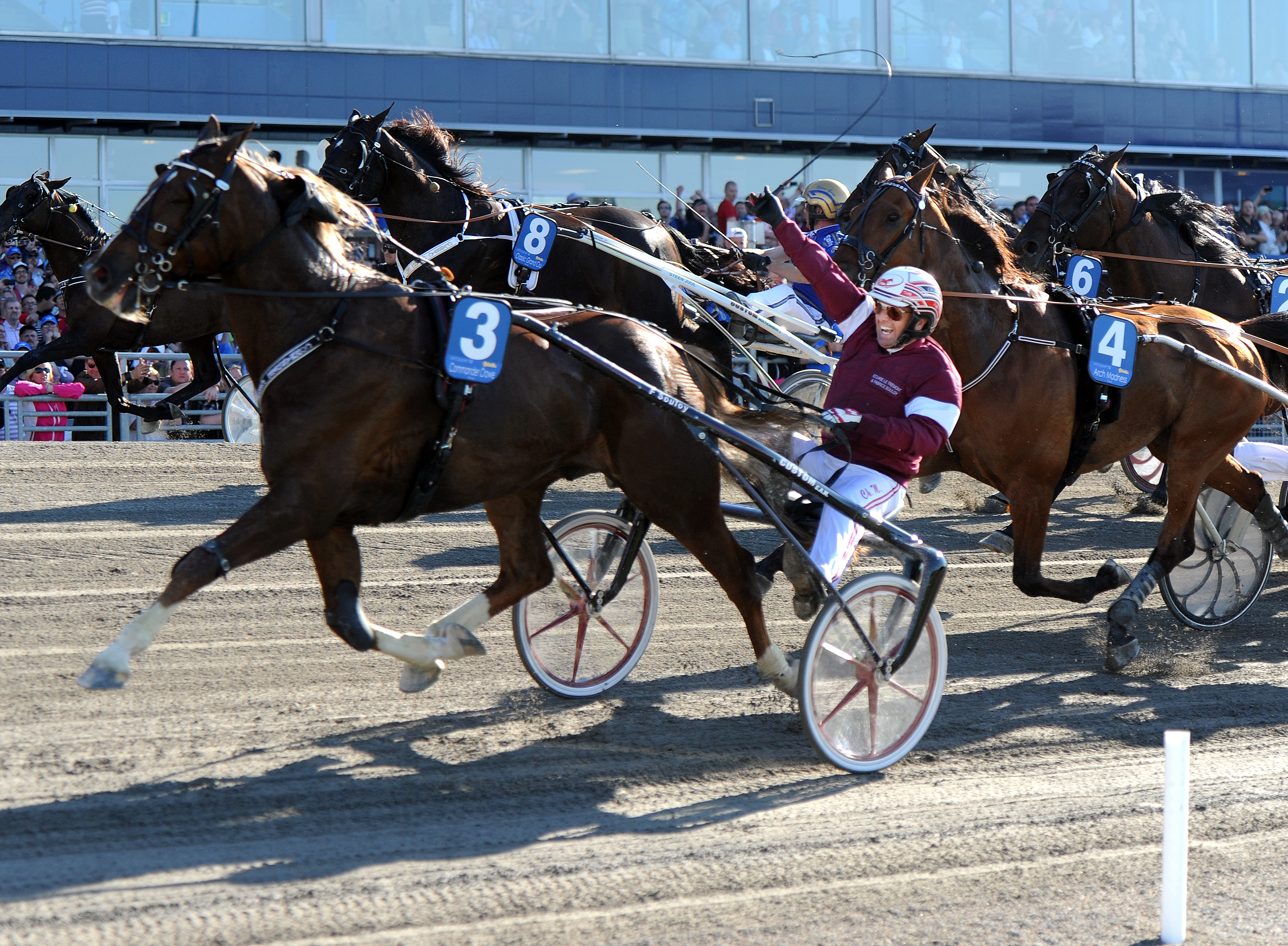 Travaren Commander Crowe och kusken Christophe Martens (ekipage nr. 3) vinner Elitloppet 2012 på Solvalla.